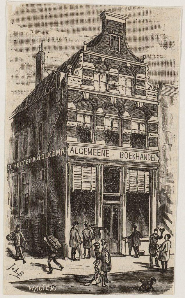 Beschrijving Scheltema-Holkema Rokin 6, de Algemeene Boekhandel van Scheltema en Holkema. Links ingang Kromelleboogsteeg. Houtgravure Documenttype prent Vervaardiger Braakensiek, J.C. (Johan Coenraad, 1858-1940) Walter, Joh. Collectie Collectie Stadsarchief Amsterdam: los beeldmateriaal Datering 1883 Geografische naam Rokin Inventarissen Afbeeldingsbestand 010194000492